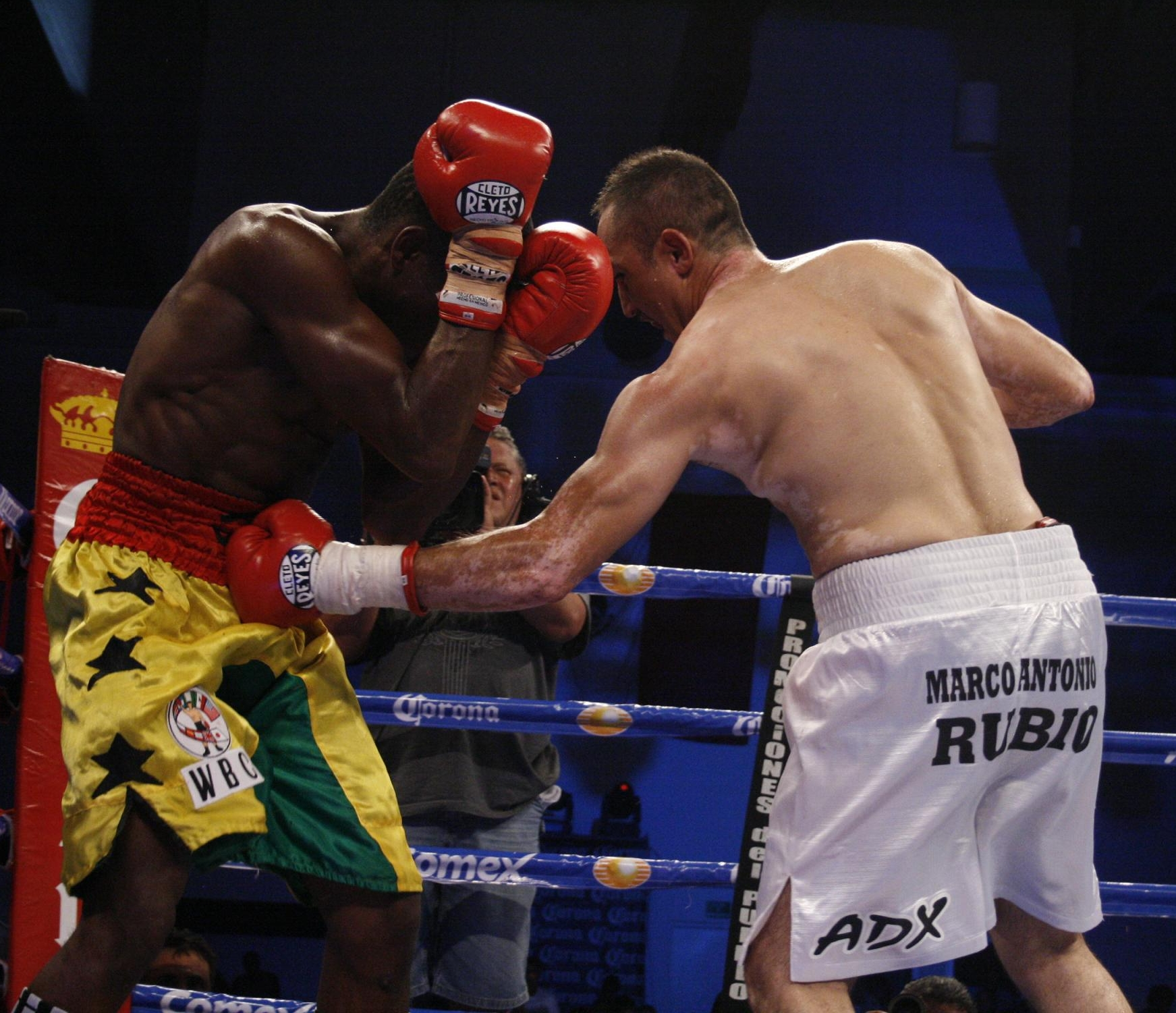 Marco Antonio Rubio vs Mohammed Akrong